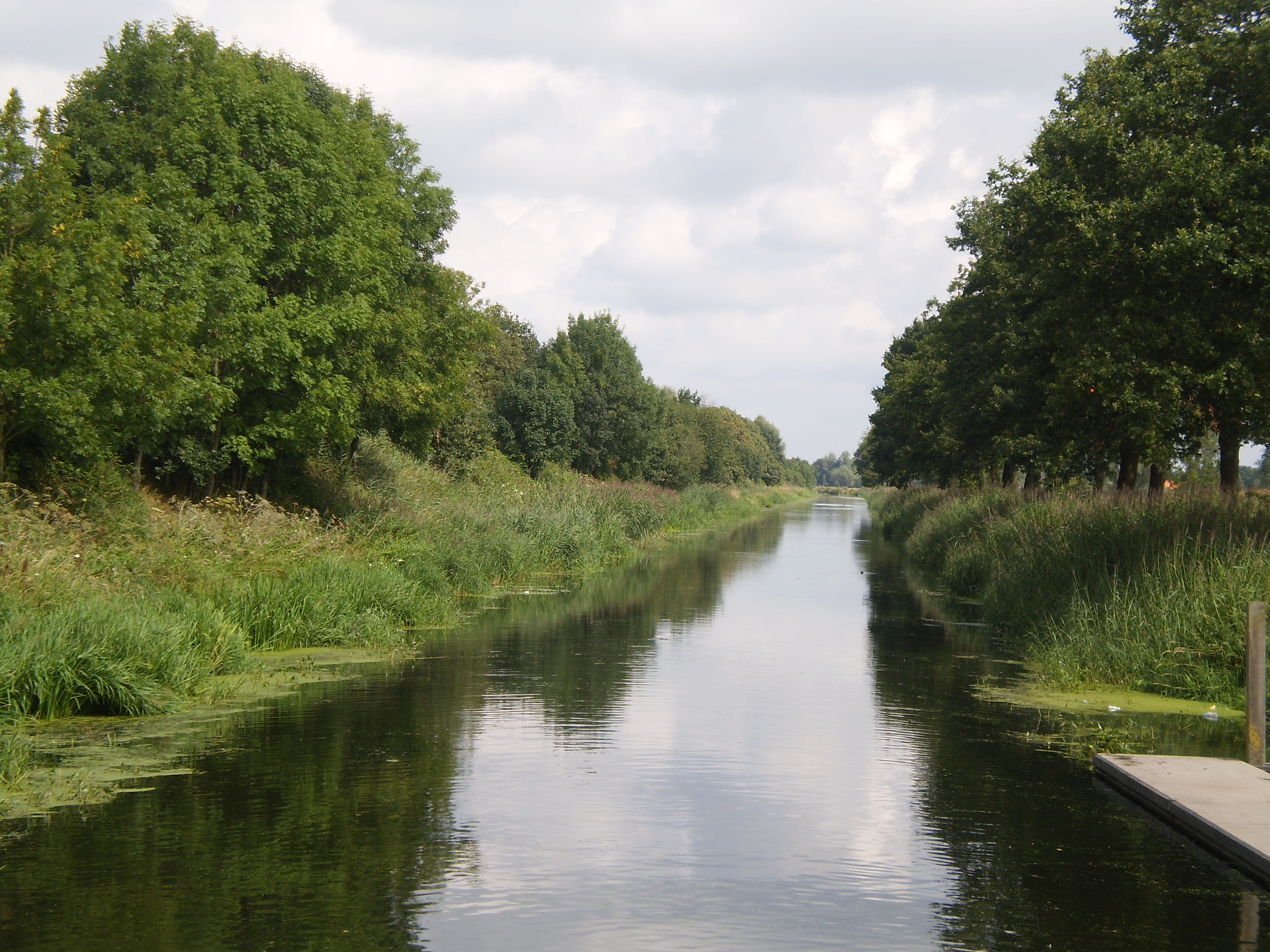 It Falleikanaal tusken Leusden en Scherpezeel.